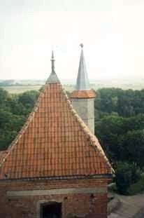 zdj. własne